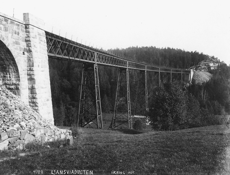 Ljansviadugten, Smaalensbanen 1900-1905